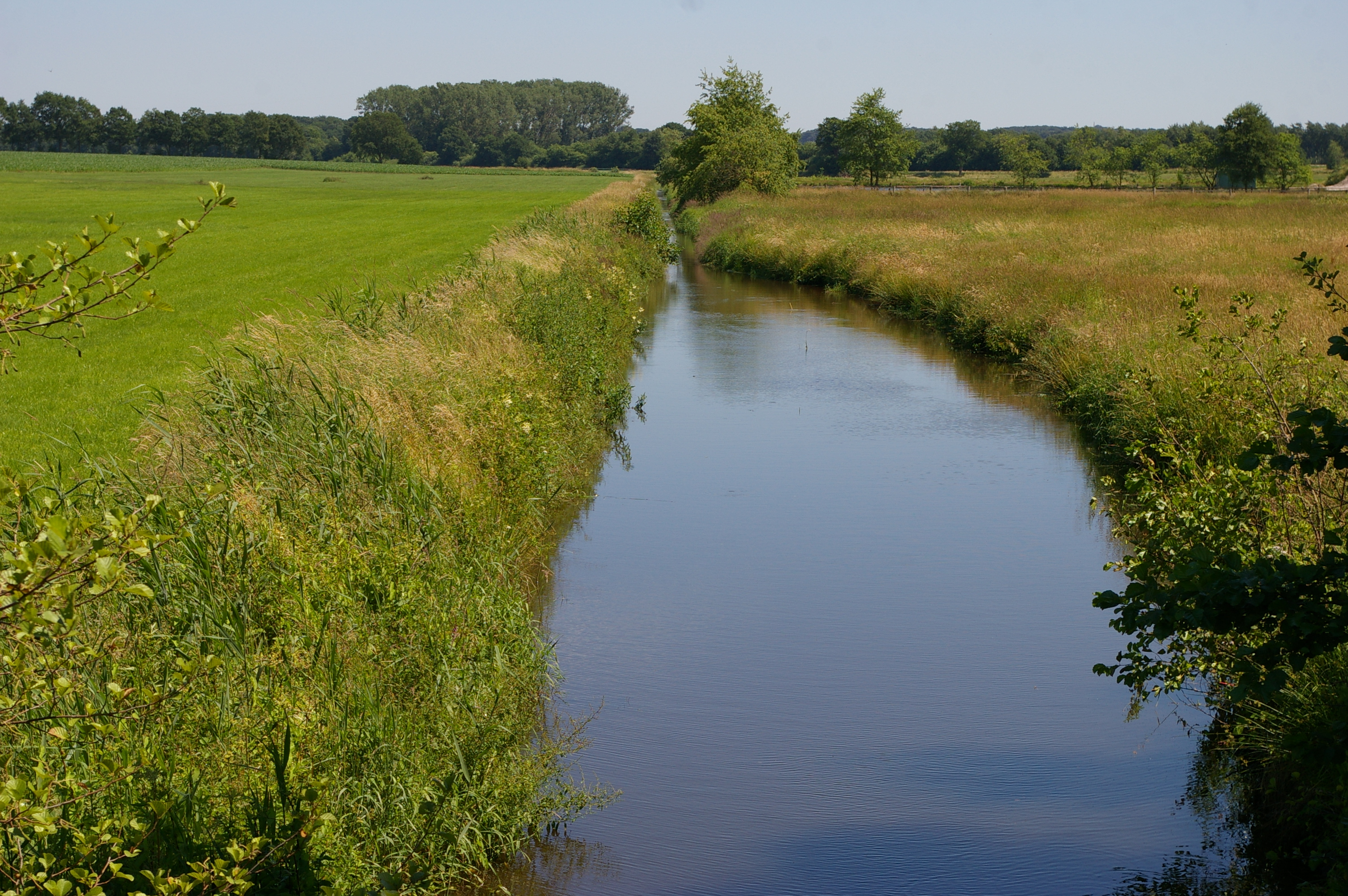 Der Speckenbach in Siedenburg